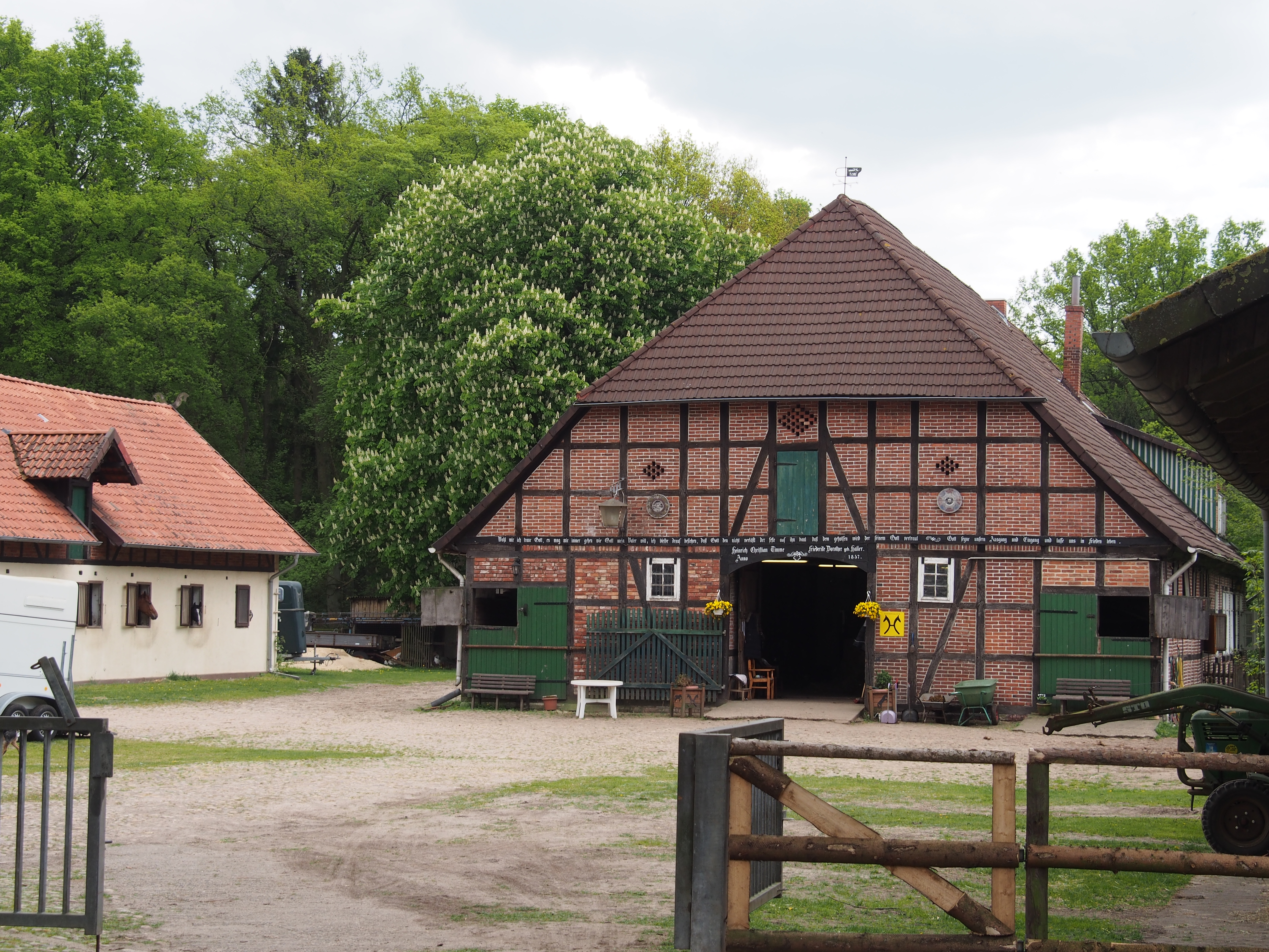 Denkmalgeschützter Bauernhof im Ortsteil Hassel Nr.1, Stadt Bergen (Niedersachsen)